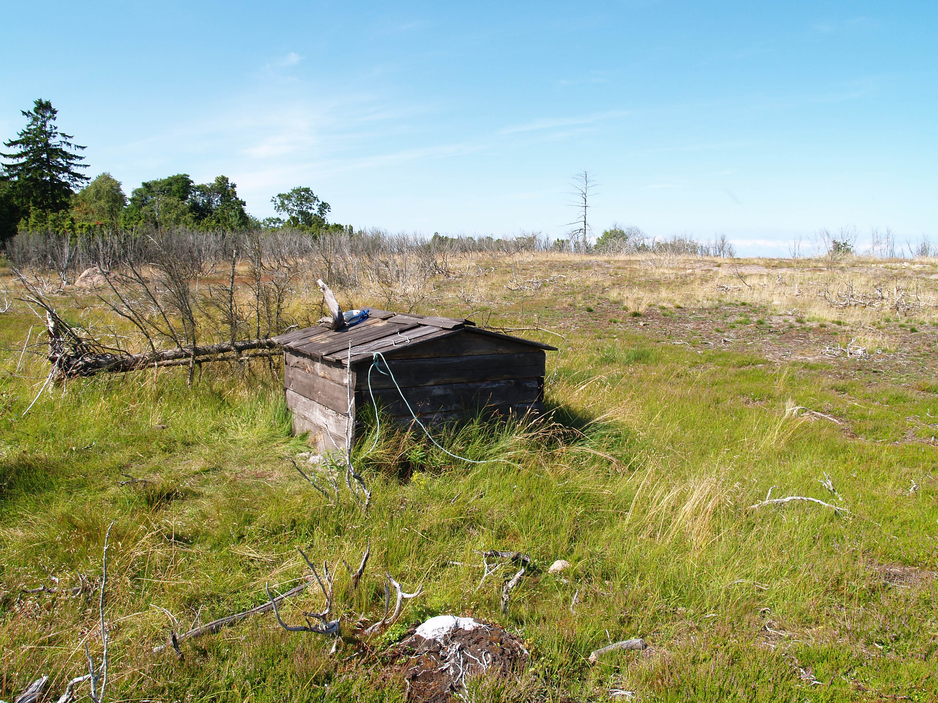 Kaev Aksi saarel.